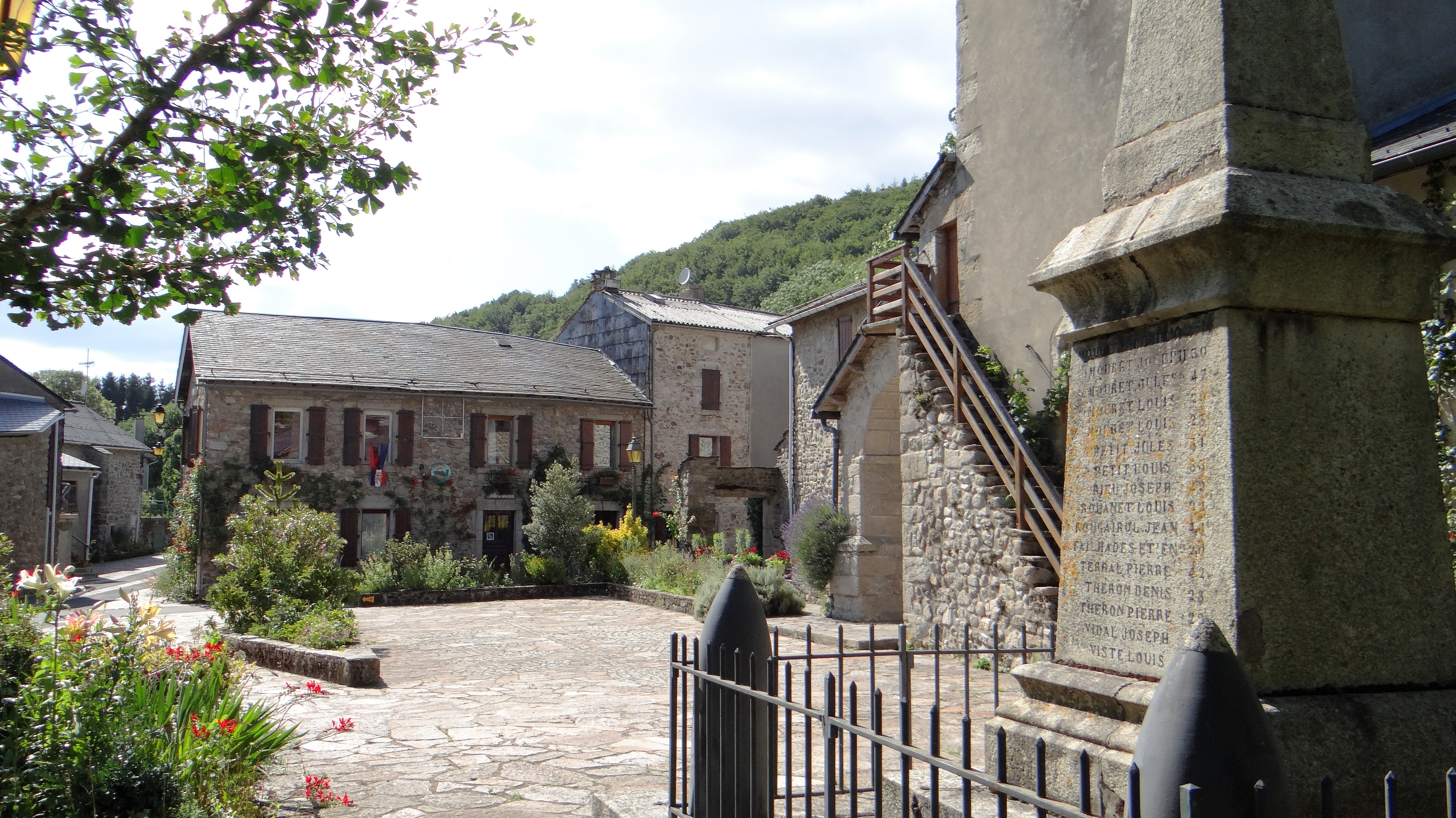 Fraïsse-sur-Agoût - Le monument aux morts, l'entrée de l'église et la mairie